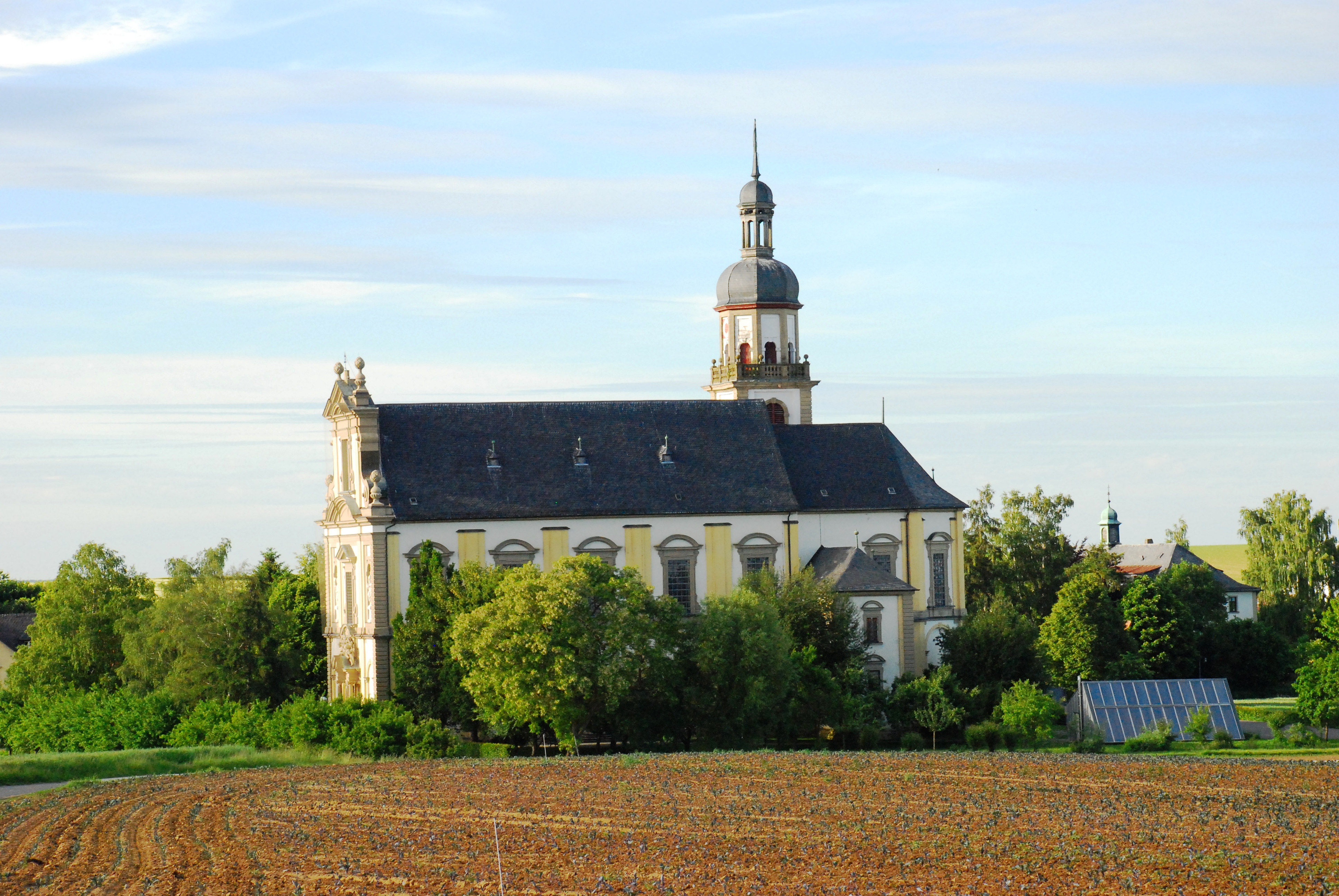 Südansicht der Wallfahrtskirche Fährbrück in Hausen, Landkreis Würzburg, Bayern. Als Baudenkmal unter Aktennummer D-6-79-143-25 in der Bayerischen Denkmalliste aufgeführt.